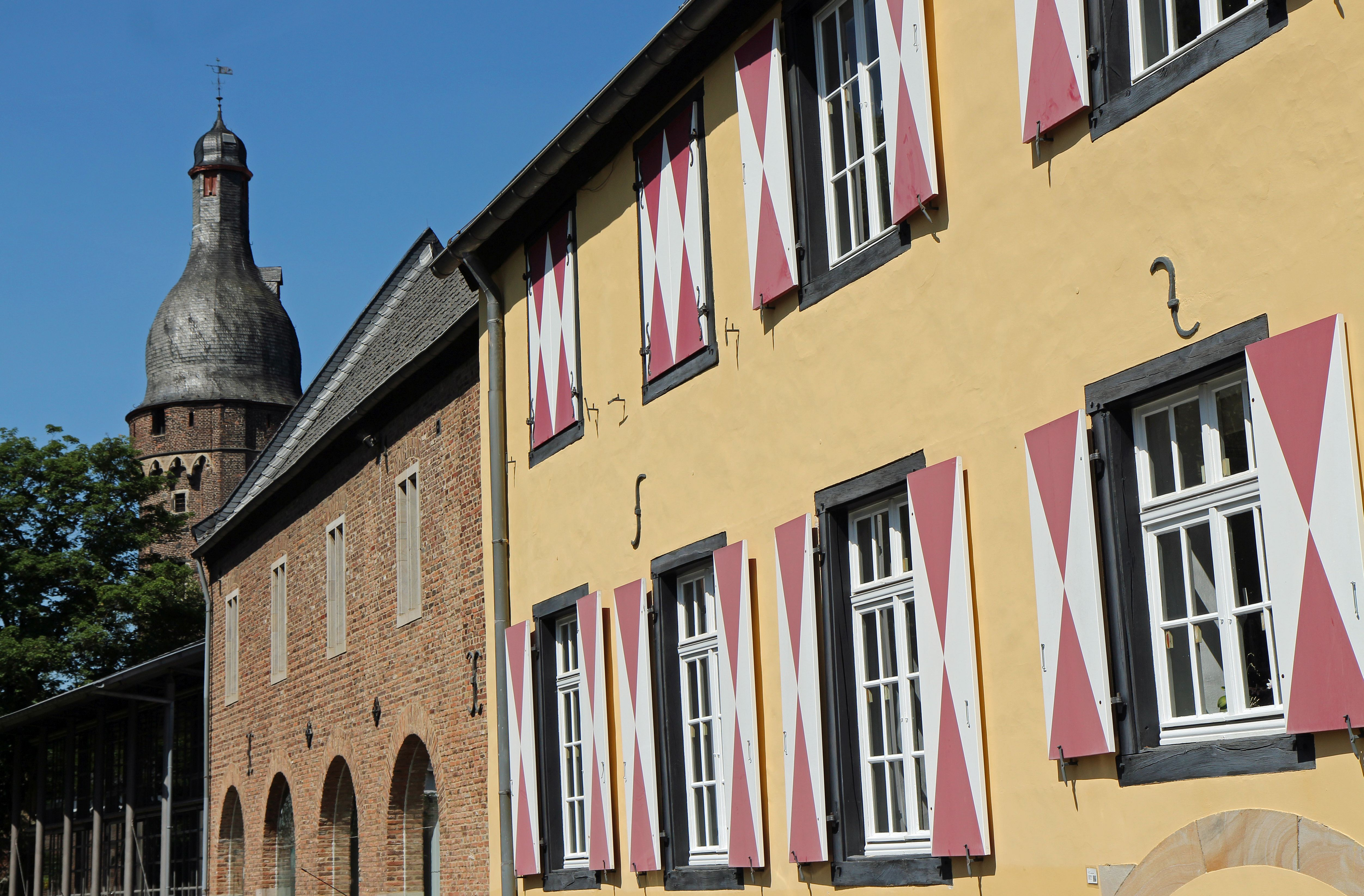 Zu sehen ist das KreisMuseum Zons in Rückansicht mit dem Juddeturm.